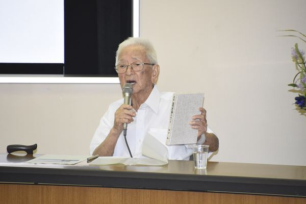 元東松山市教育長